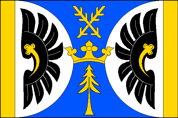 vlajka, Radňovice, okres Žďár nad Sázavou